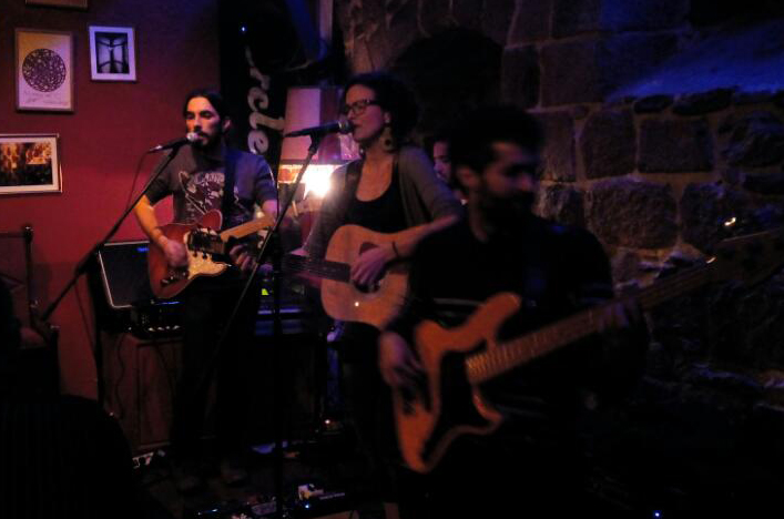 El grup musical Acousters de Girona.